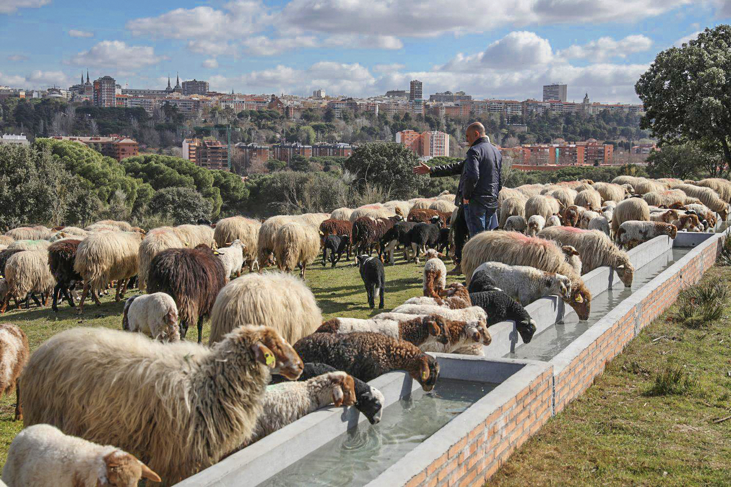 La Casa de Campo cuenta desde esta semana con un rebaño de ovejas. De este modo, este parque forestal, protegido como Bien de Interés Cultural, contará con un eficaz medio para la prevención de incendios, además de regenerar el suelo.